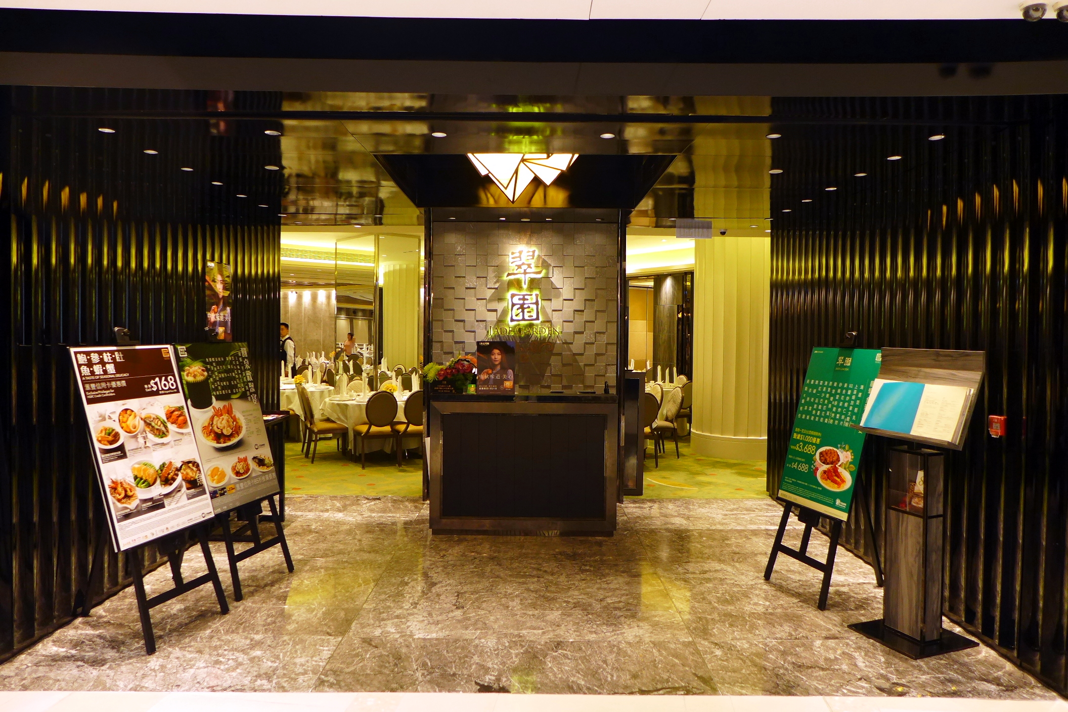 Jade Garden in PopCorn Level 2